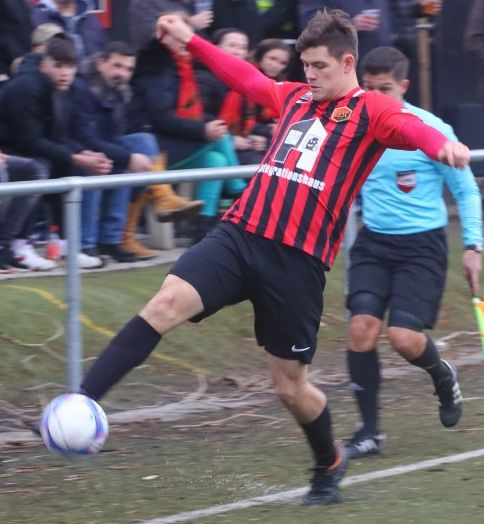 1.SSC-Stürmer Andreas Rossak während eines Meisterschaftsspiels mit dem Integrationslogo auf der Brust